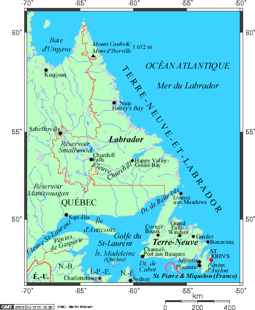 Carte de Terre-Neuve-et-Labrador.